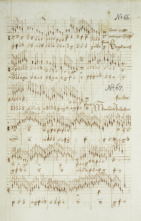 Buxheimer Orgelbuch conservé à Munich, Bayerische Staatsbibliothek, Cim. 352b, folio 169 recto.